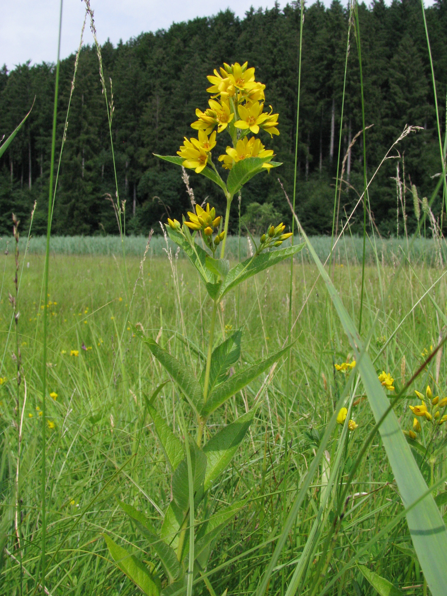 Gewöhnlicher Gilbweiderich (Lysimachia vulgaris) im Kupferbachtal nördlich von Oberstetten